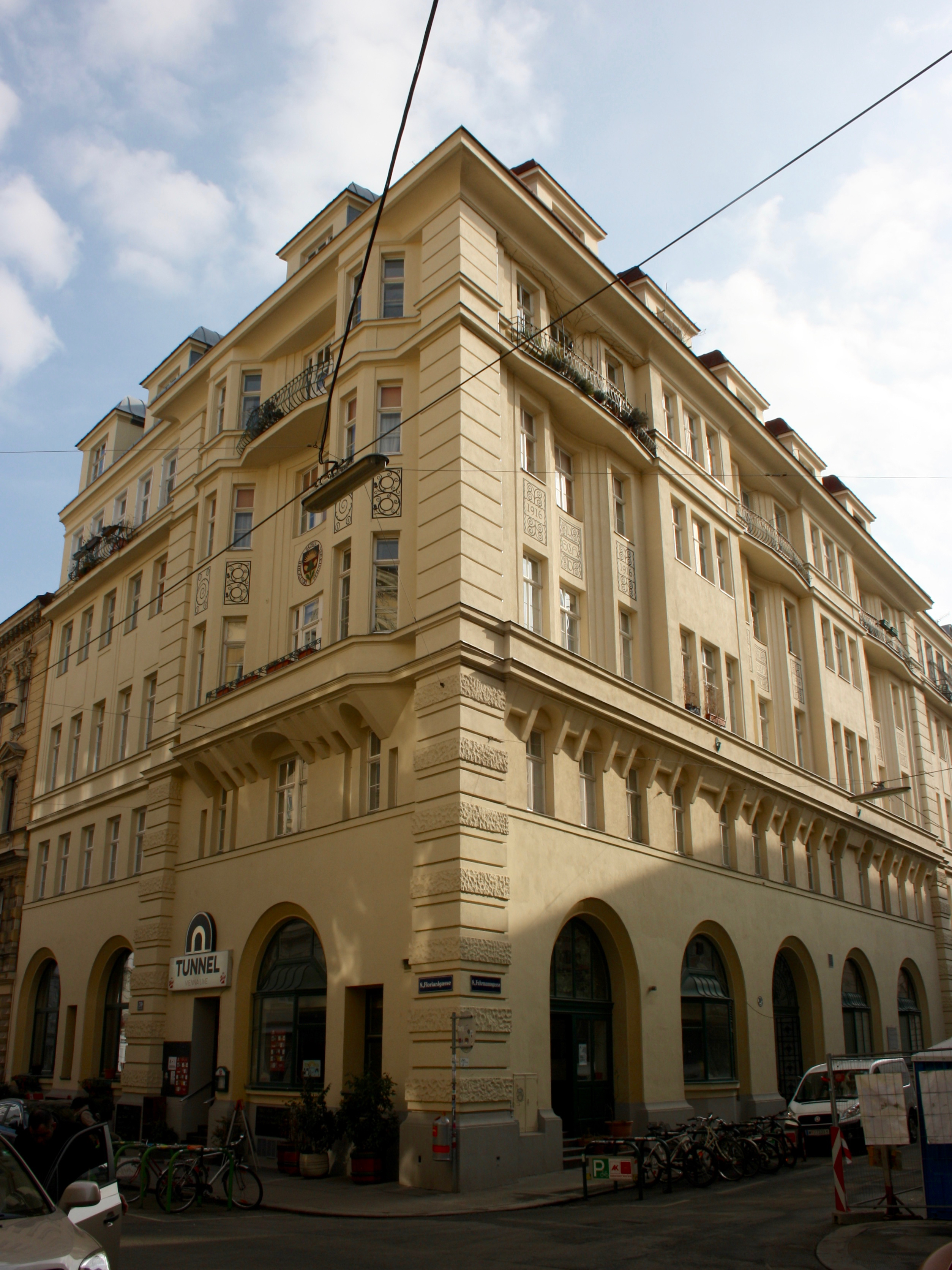 Schulvereinshaus. Fuhrmannsgasse 18A / Florianigasse 39, Wien-Josefstadt.